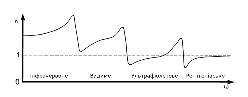 Залежність показника відбиття від частоти світла, від інфрачервоного до рентгенівського діапазону